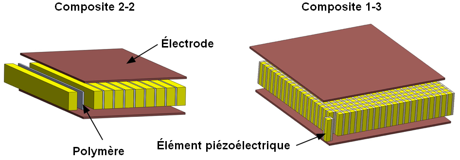 Schéma de différents piézocomposites